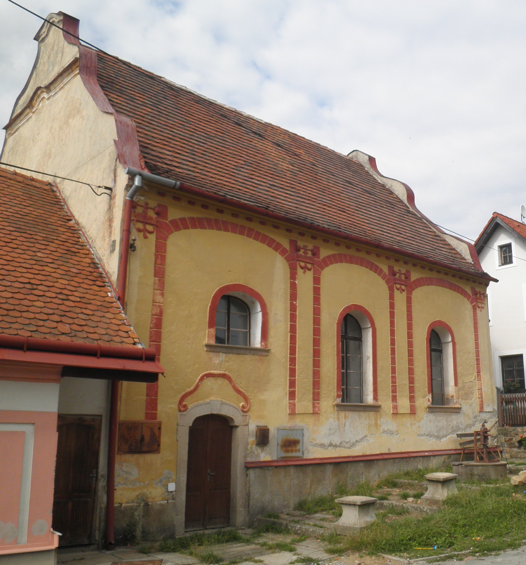 Bývalá synagoga v Batelově.